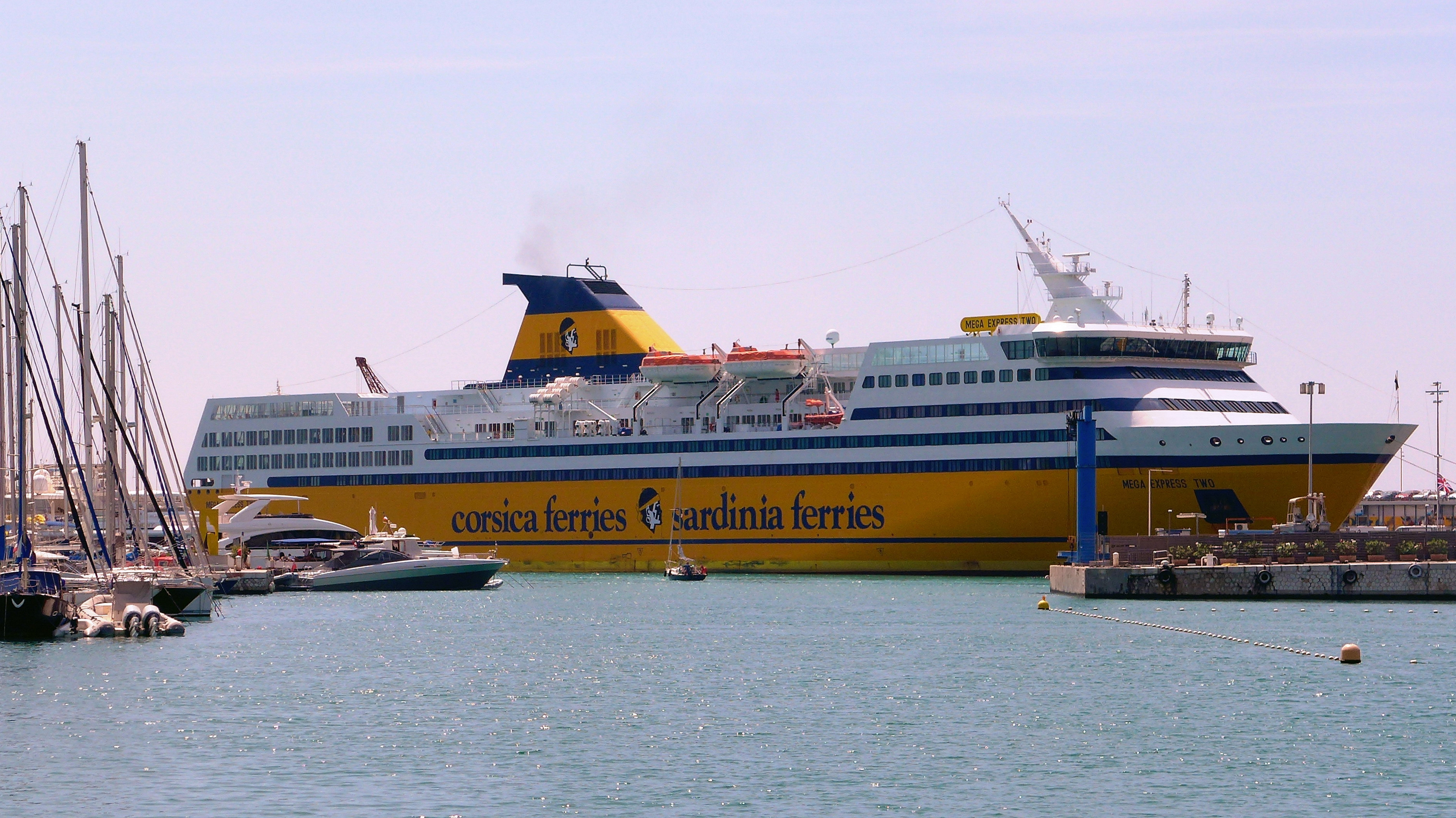 Corsica Ferries Mega Express Two im Hafen von Nizza